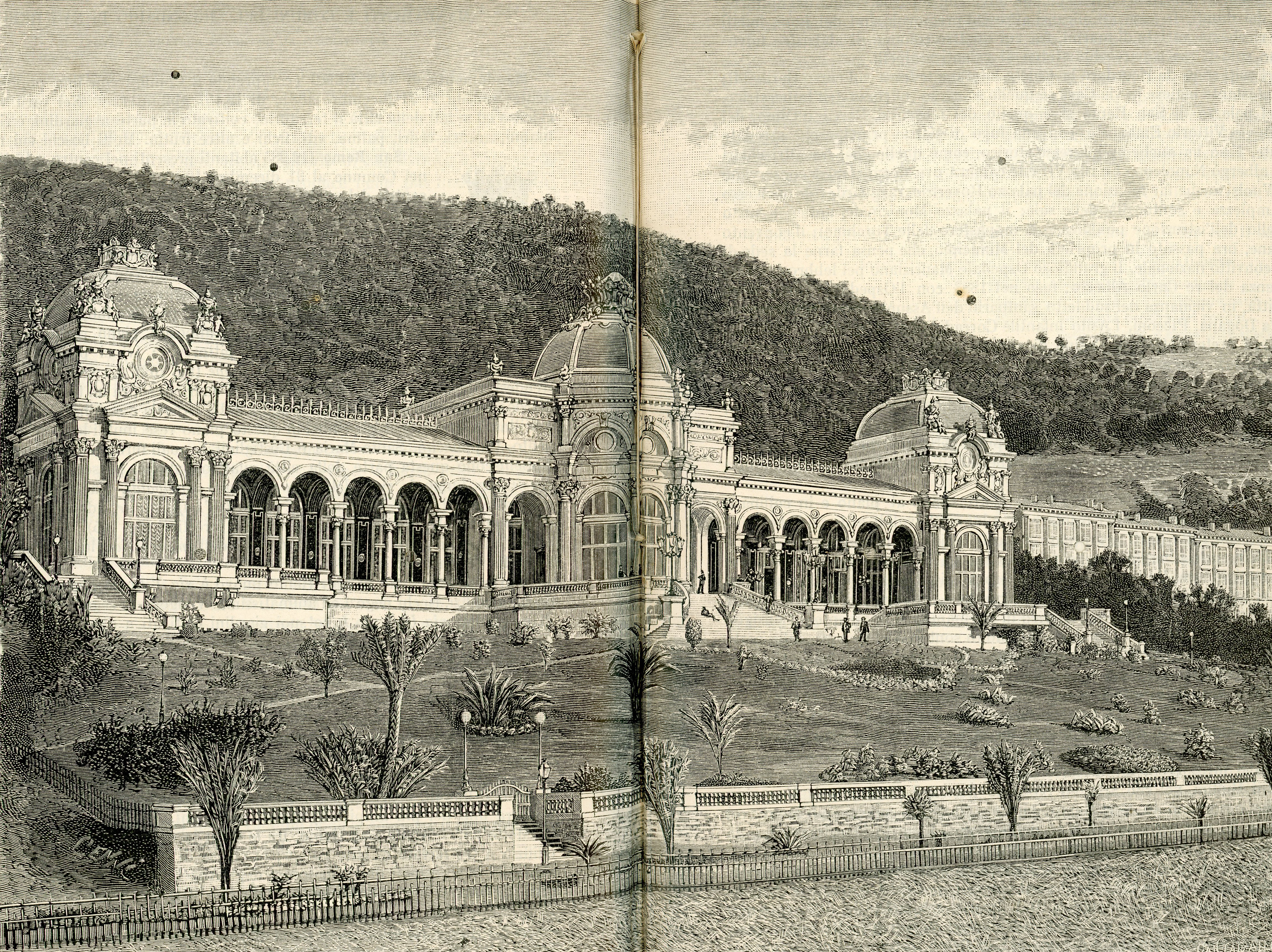 San Remo: stabilimento sanitario di Ospedaletti e Hôtel Regina (xilografia).